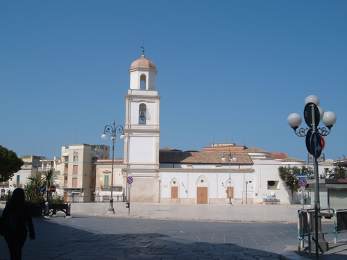 Chiesa di san Sabino vista da Piazza Vittorio Veneto